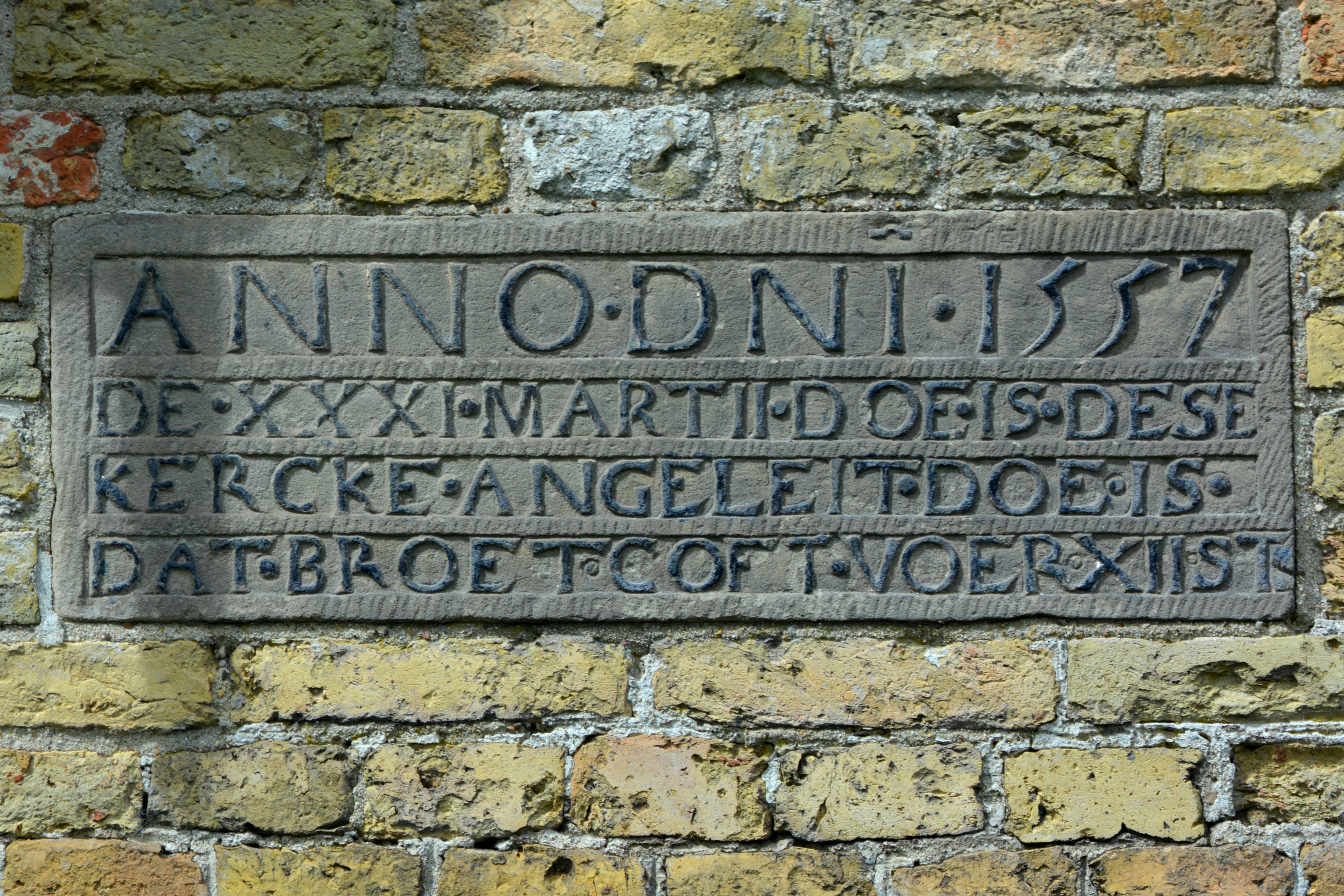 Lytsewierrum, Gertrudiskerk, gevelsteen